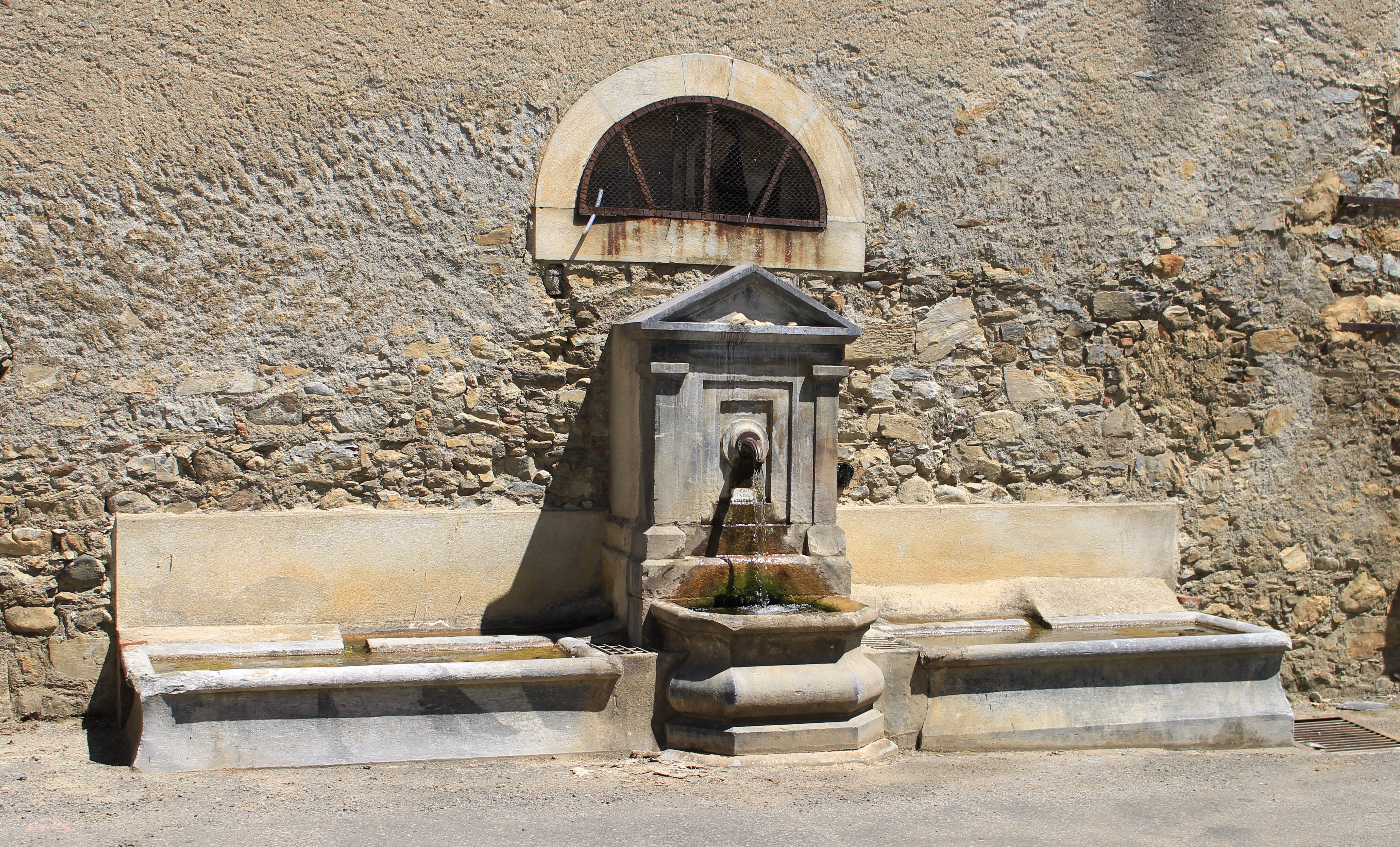 Fontaine de Beaudéan (Hautes-Pyrénées)